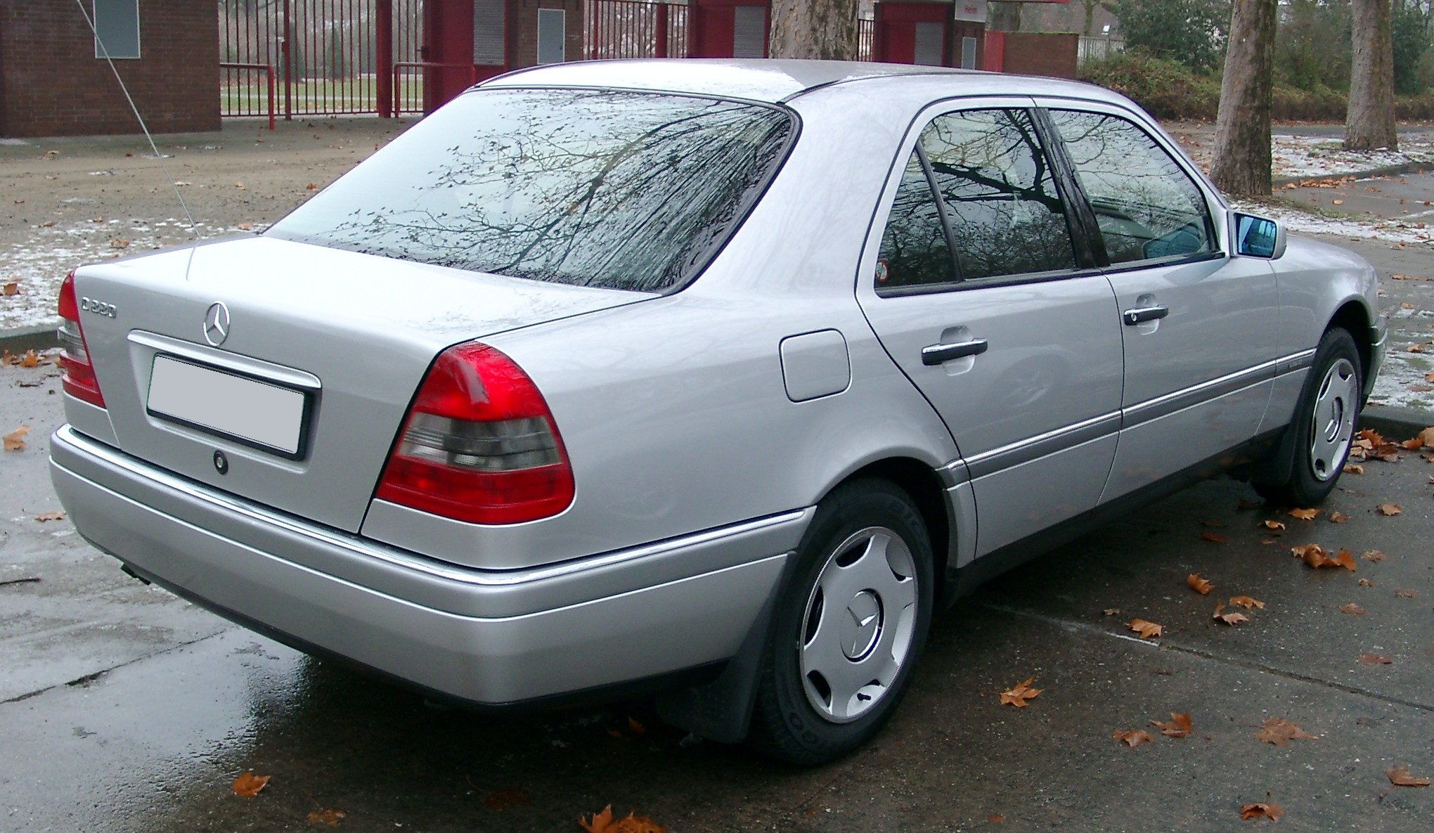 Mercedes-Benz W202